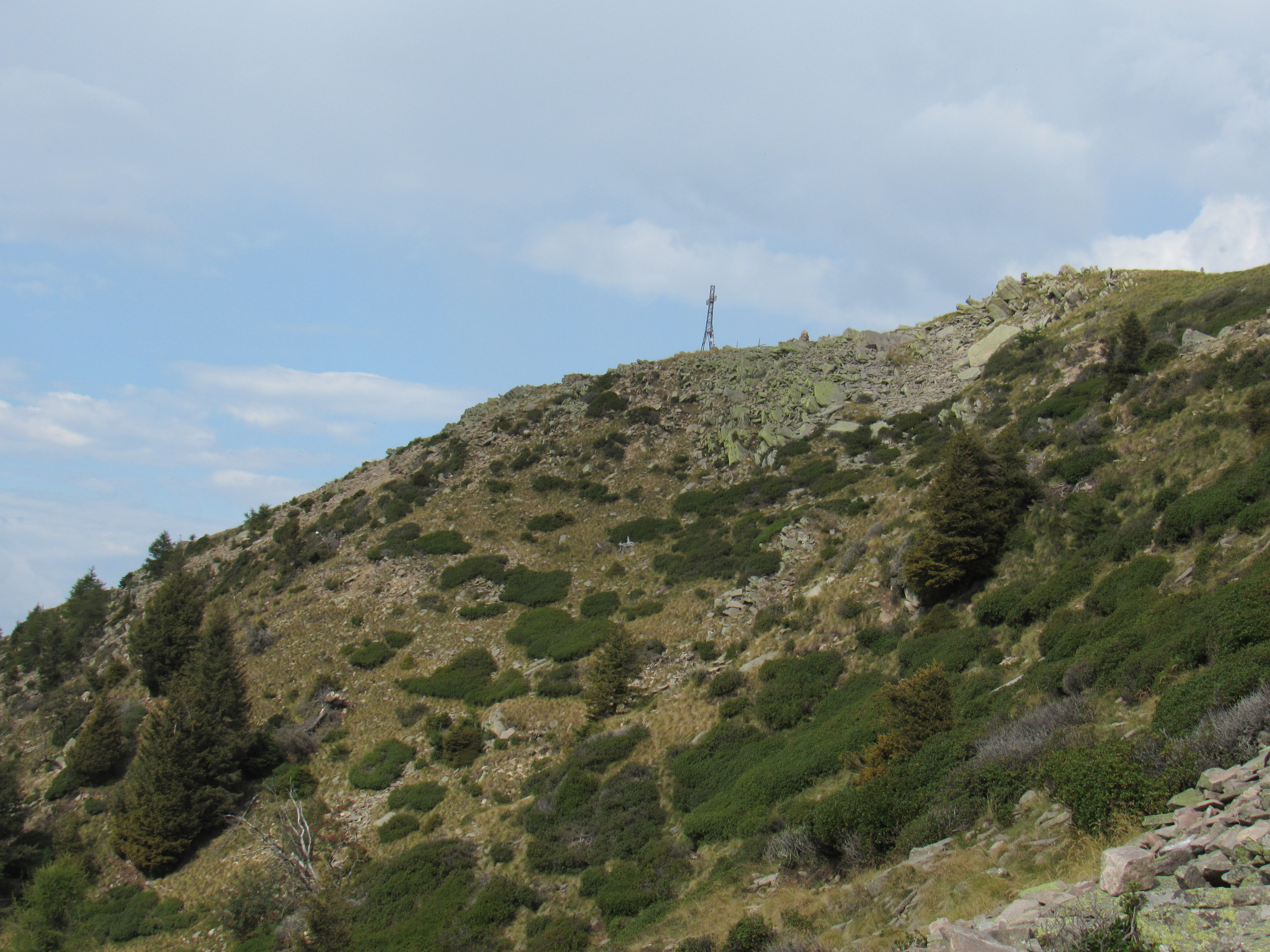 Dosso di Costalta (1955 m), Lagorai.